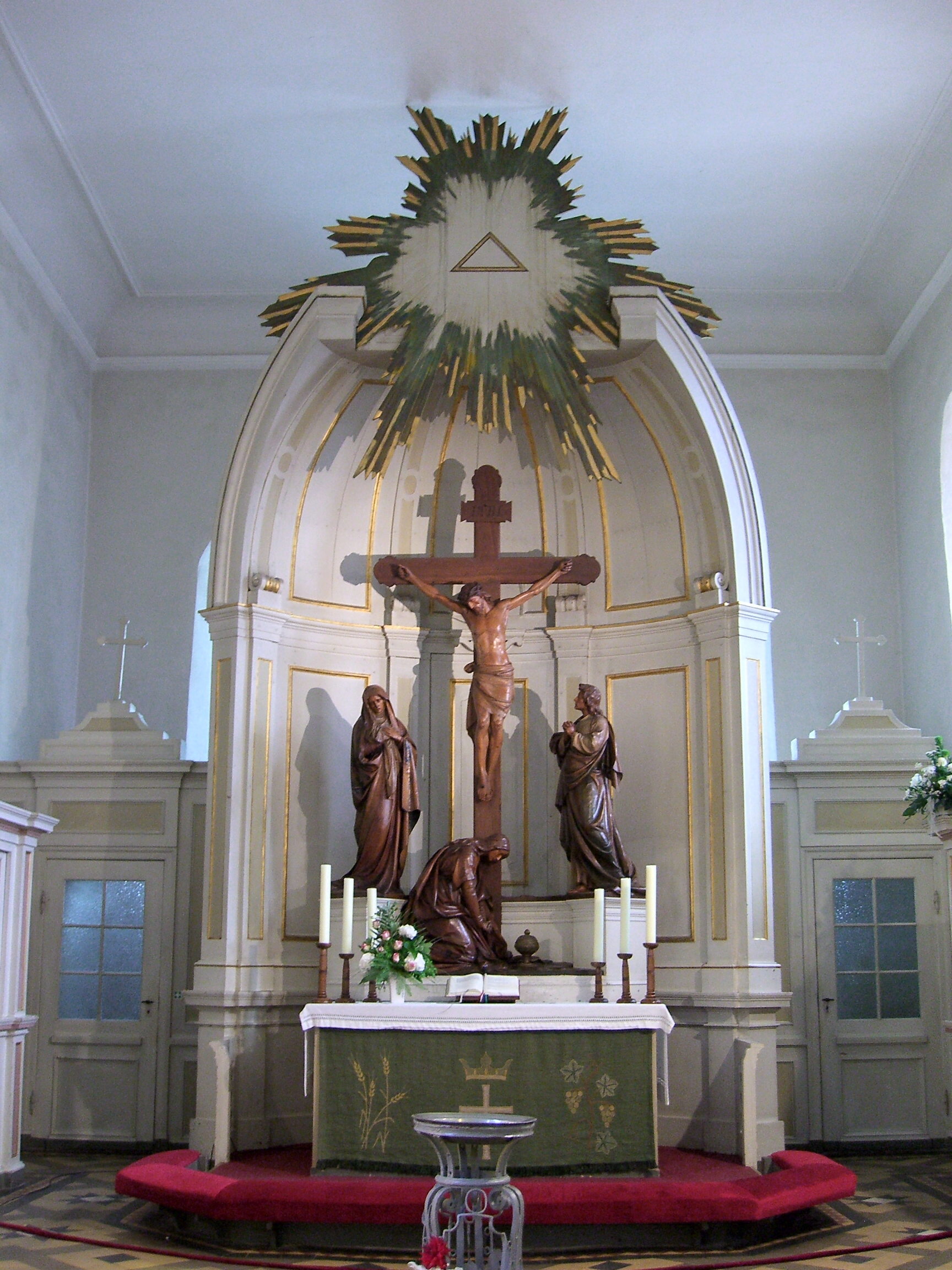 Waren (Müritz) Altar der Kirche St. Marien